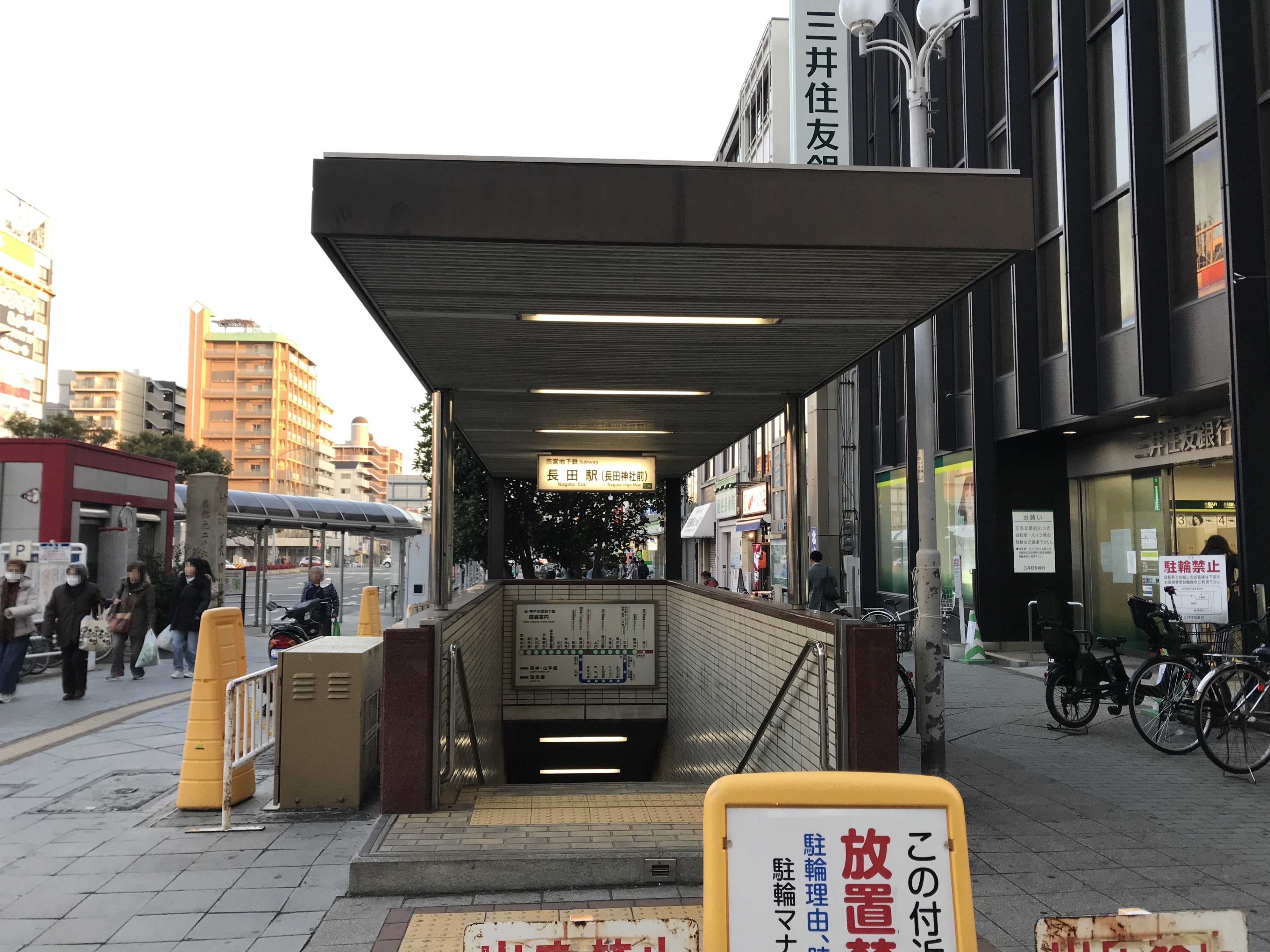 長田駅の西2番出入り口